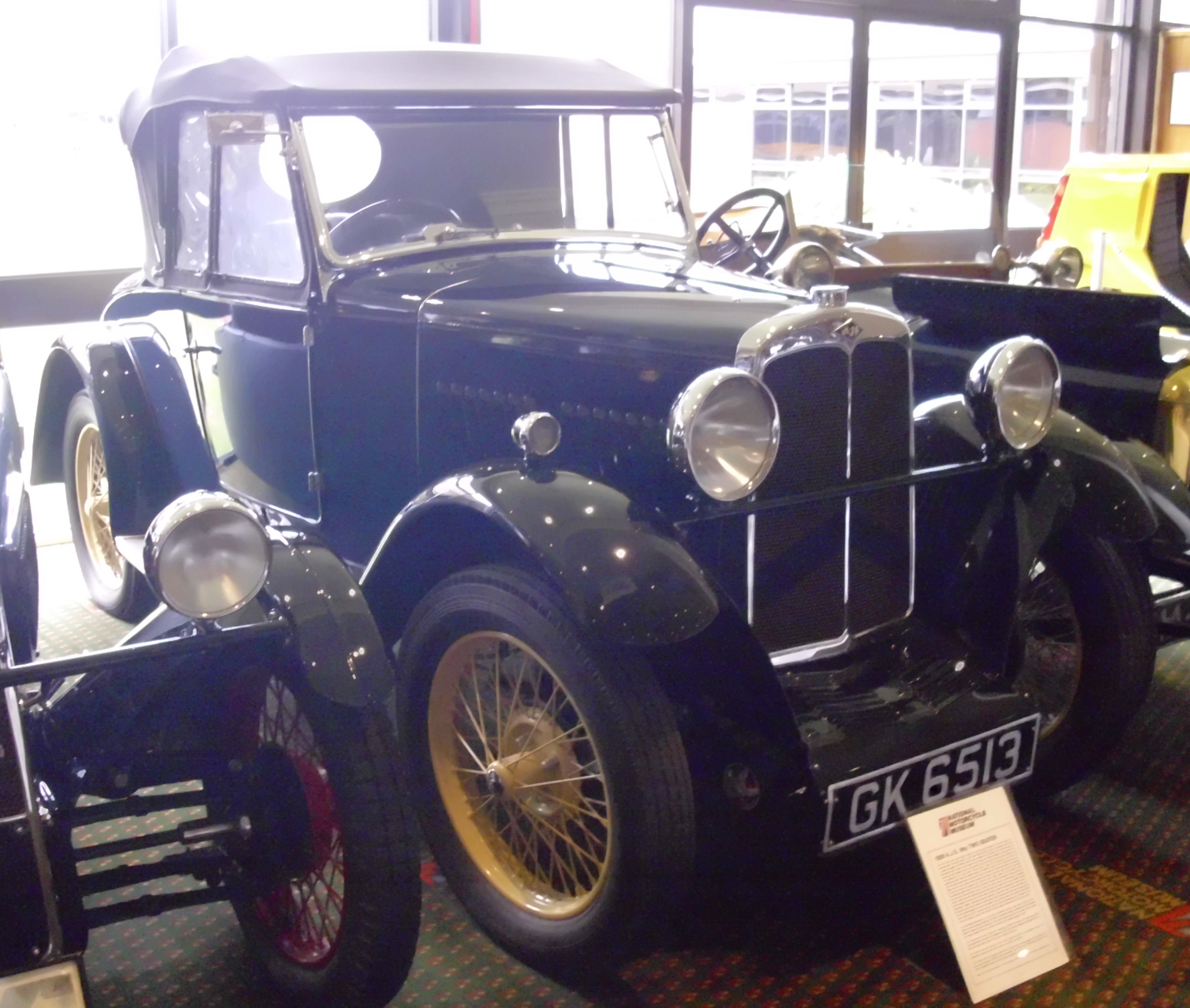 AJS 9 HP 1929